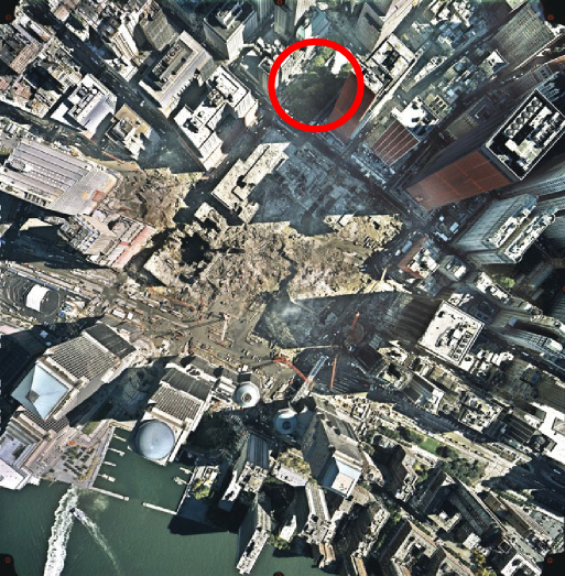 situation de la chapelle Saint-Paul (entourée en rouge)